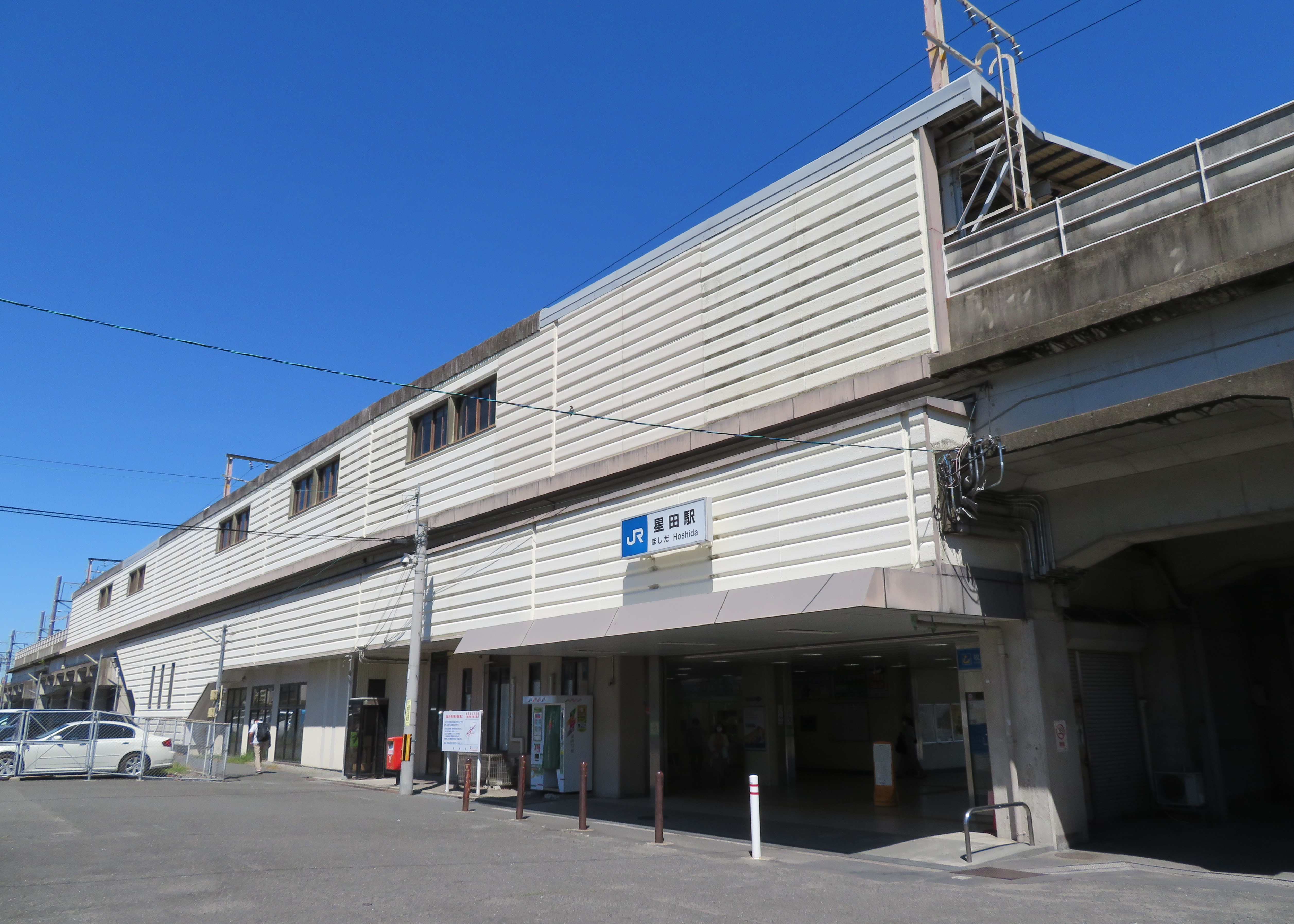 JR星田駅